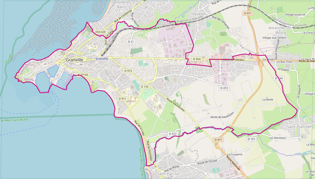 carte réalisée sur umap This map may be incomplete, and may contain errors. Don't rely solely on it for navigation.